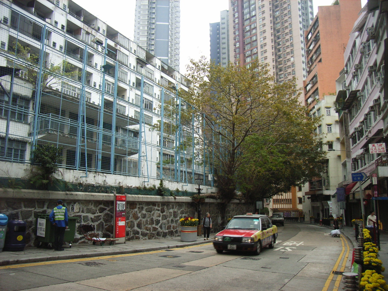 {荷李活}-道警察宿舍是zh:香港一處前已婚高級zh:警察zh:宿舍，位於zh:香港島上環的-{荷李活道}-，正門在其東面的zh:鴨巴甸街35號。 By SHOLYWOD